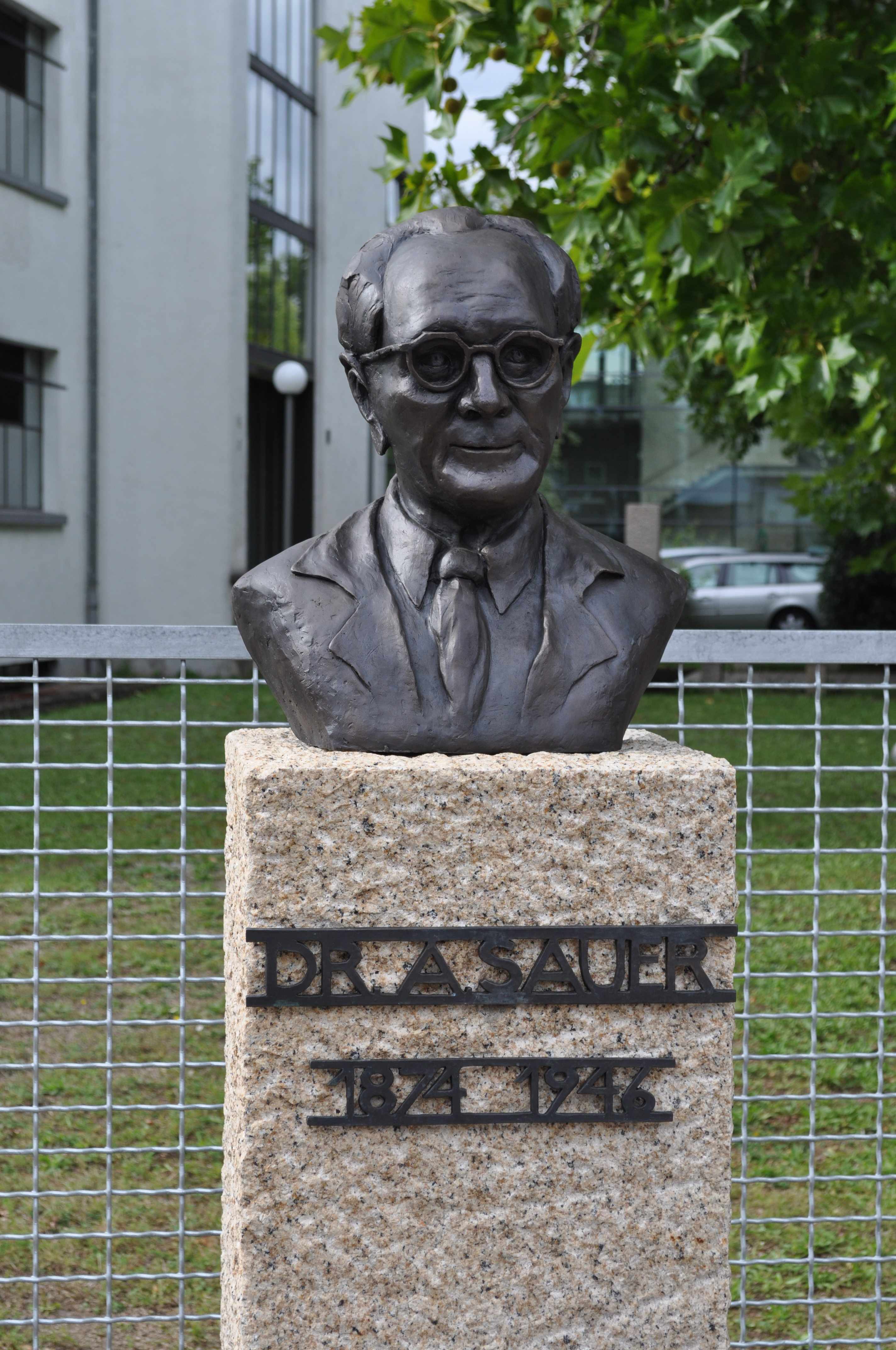 Arthur Sauer (* 30. April 1887 in Wiesentheid; † 29. November 1946). - Die Büste des Chemikers und Gründers der Fissan-Werke wurde 2010 am Rande des ehemaligen Firmengeländes aufgestellt